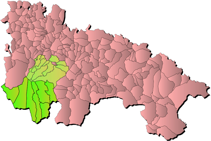 Demarcación de la subcomarca de las 7 villas